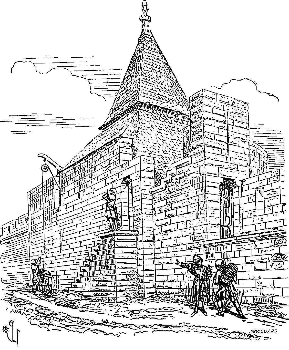 Dessin extrait de l'ouvrage La cité de Carcassonne par Eugène Viollet-le-Duc. Le dessin est intitulé : Figure N°11. Notice Gallica : Type : texte imprimé, monographie Auteur(s) : Viollet-le-Duc, Eugène-Emmanuel (1814-1879). Auteur du texte Titre(s) : La cité de Carcassonne (Aude) [Texte imprimé] / par Viollet Le Duc Publication : Paris : Librairie des imprimeries réunies, 1888 Description matérielle : 85 p. : ill. ; in-8 Sujet(s) : Carcassonne (Aude) -- Cité -- Histoire Notice n° : FRBNF36570974